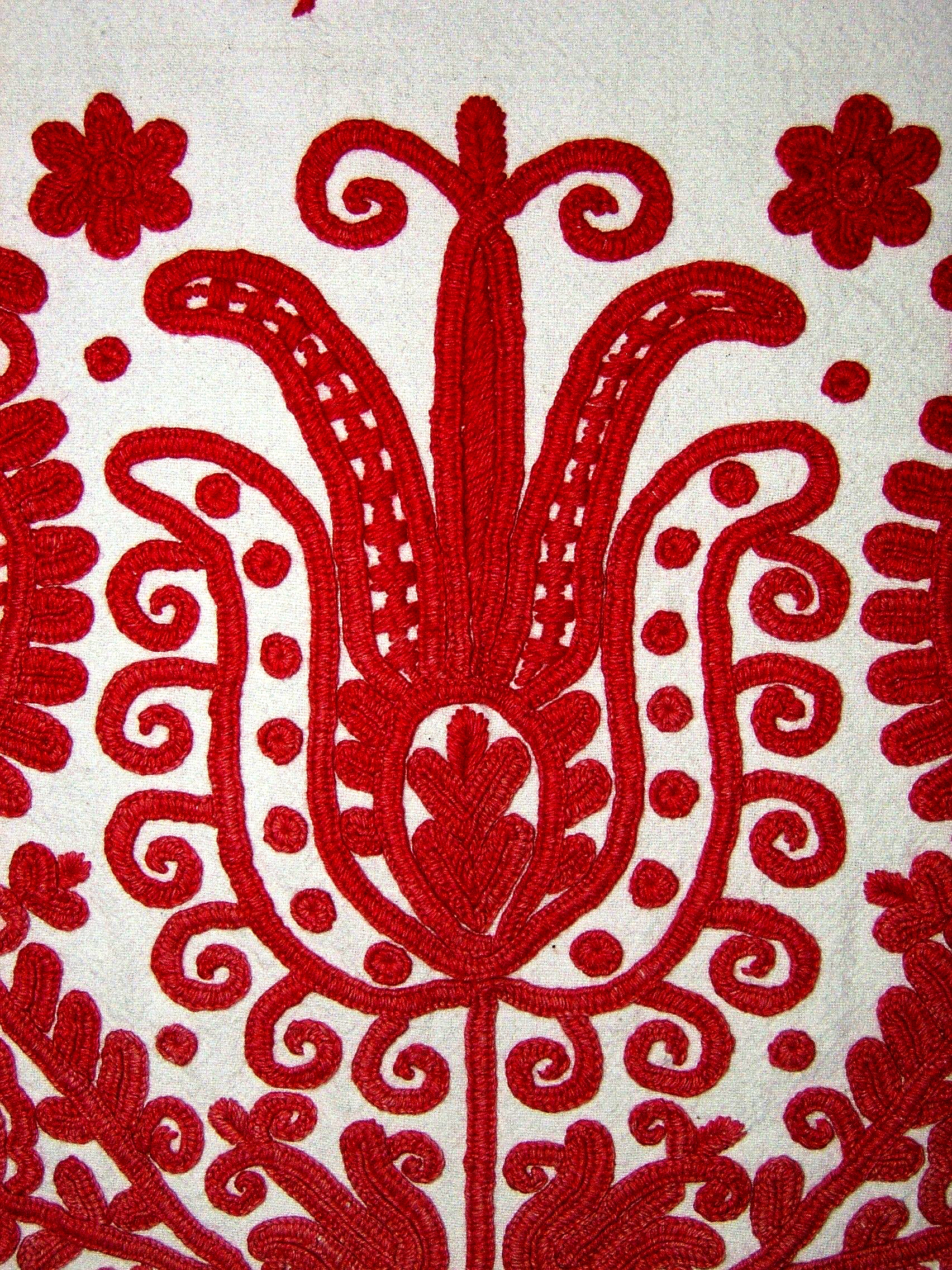 Motif traditionnel hongrois de Kalotaszeg